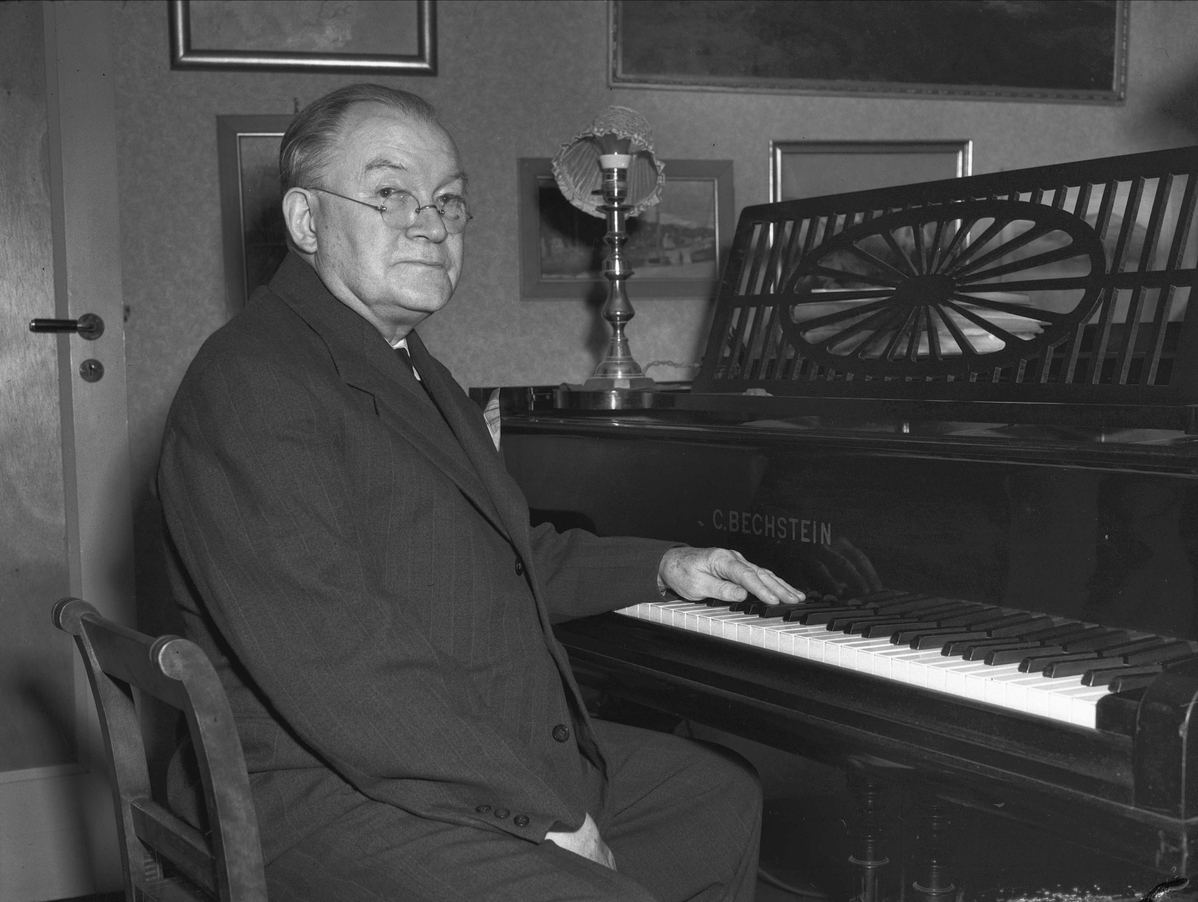 Den norsk komponisten og pianisten Johan Backer Lunde.